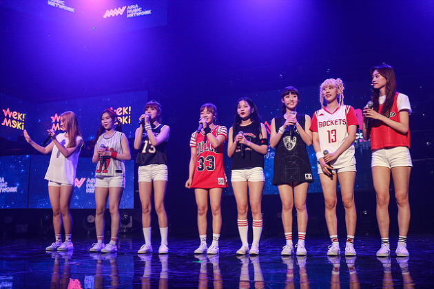 09월 26일 뮤콘 쇼케이스 MUCON Showcase 위키미키(Weki Meki)